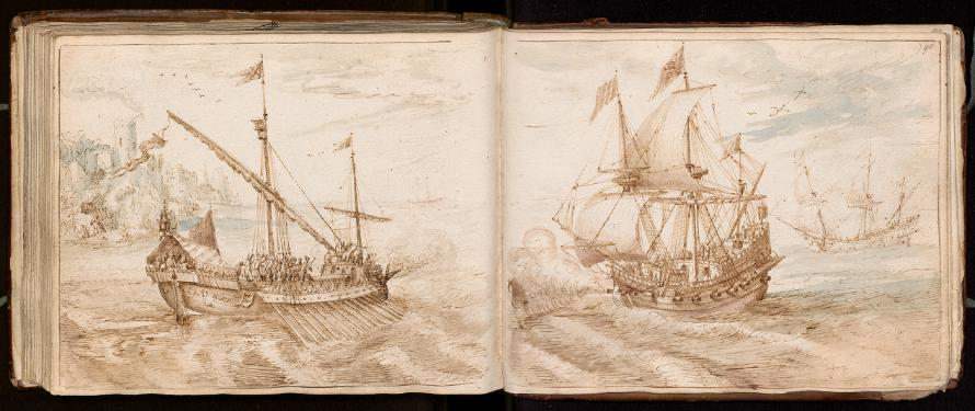 Tekening: zeeslag tussen een Spaanse galei en een Hollandse driemaster. Pen en bruine inkt, bruin en blauw gewassen. Gesigneerd: AD Willars. Volgens Vignau voert de galei de vlag van de Spaanse Habsburgers met het Bourgondische andreaskruis, en het andere schip de prinsenvlag en de vlag met de Nederlandse leeuw. Vanaf de voorsteven wordt geschoten, op de achtergrond naderen andere schepen. Adam Willaerts (1577-1664), afkomstig uit een Antwerpse familie, woonde en werkte sinds circa 1602 als schilder in Utrecht. In 1611 was hij met Moreelse oprichter van het St. Lucasgilde, waarvan hij meermalen deken was. Hij legde zich toe op het schilderen van stads-, zee- en strandgezichten. (Bron: Digital Collections Universiteitsbibliotheek Leiden)